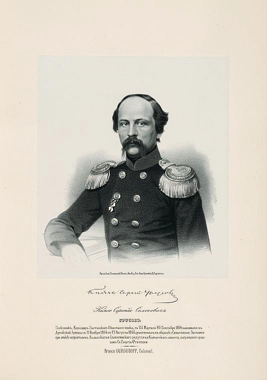 Князь Сергей Семенович Урусов, генерал-майор, герой Крымской войны.